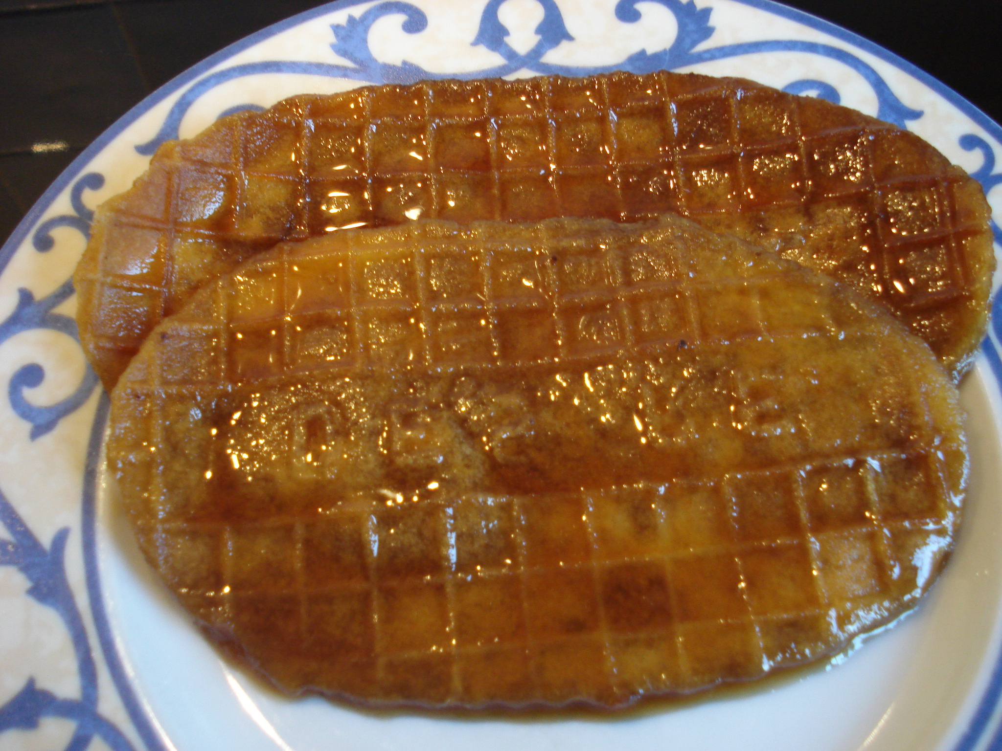 Lackmans